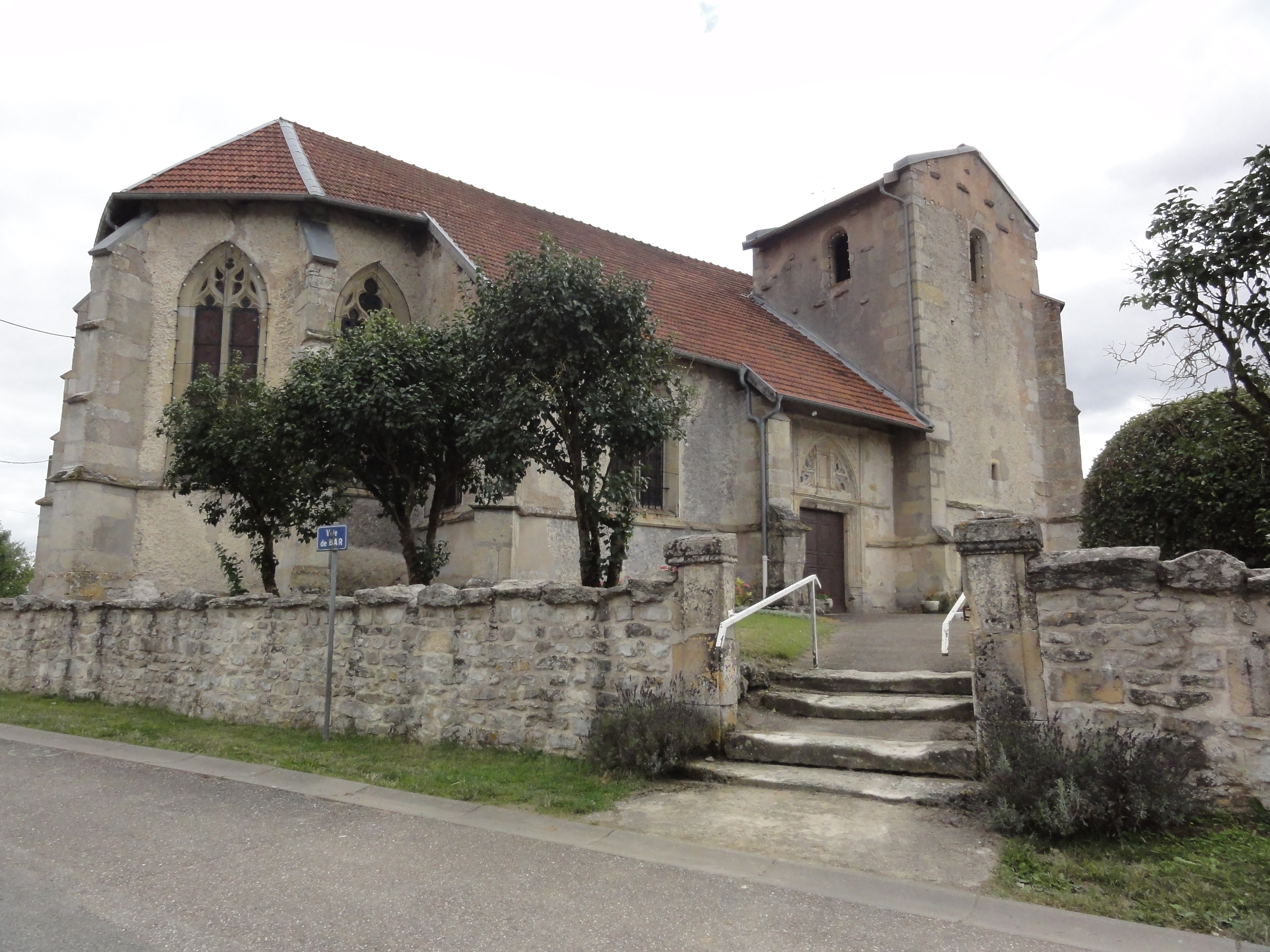 Église Saint Mansuy d'Érize-la-Brûlée